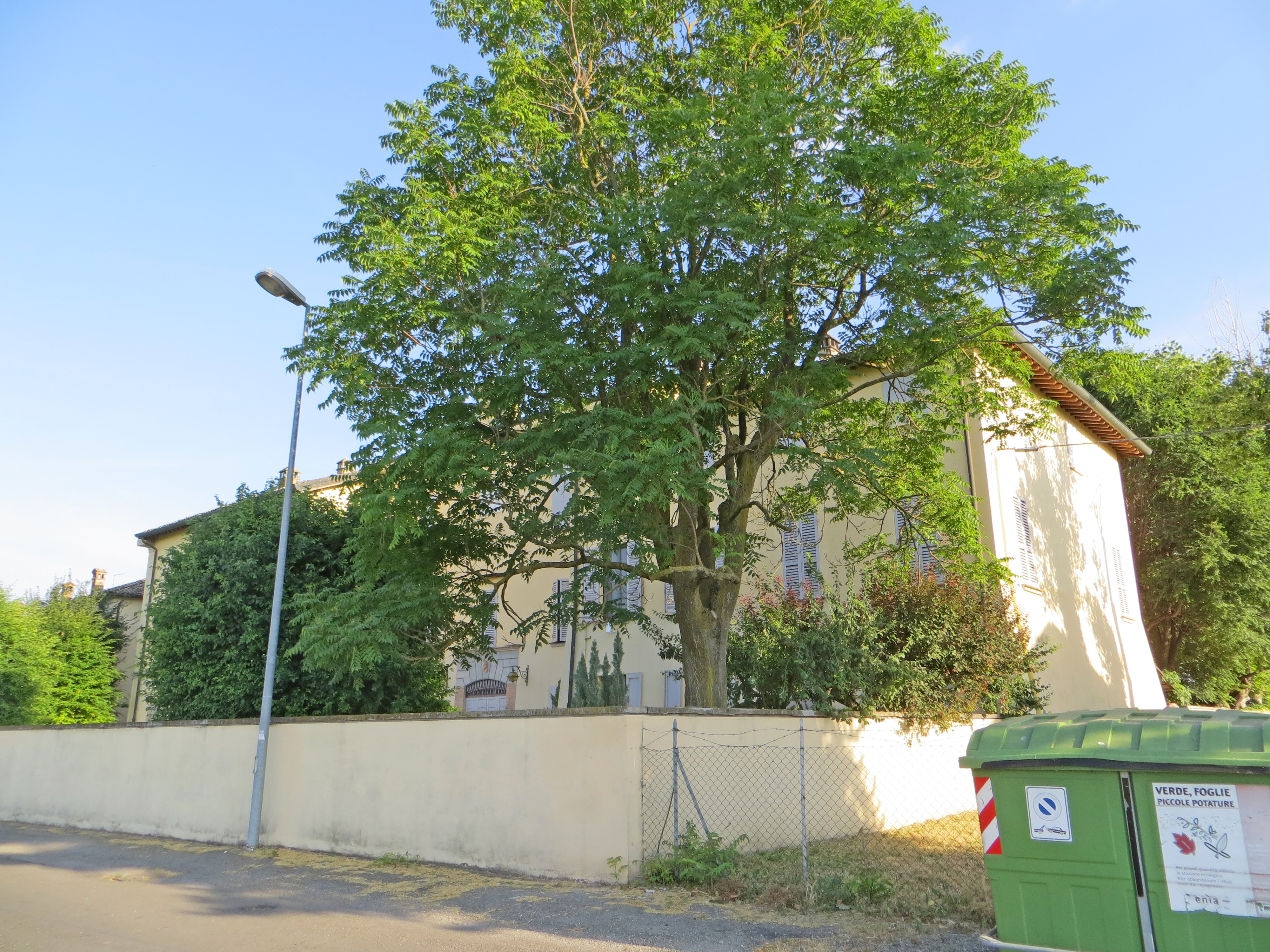 Villa Petitot (Marore, Parma) - facciata e lato ovest